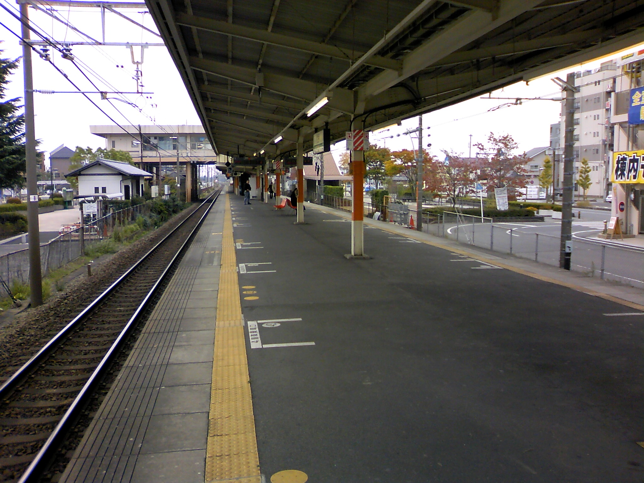 行田駅のホーム